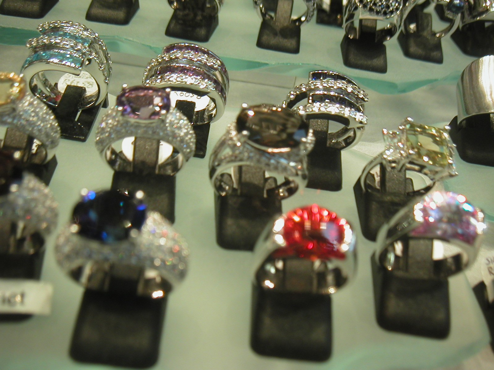 Vancouver BC